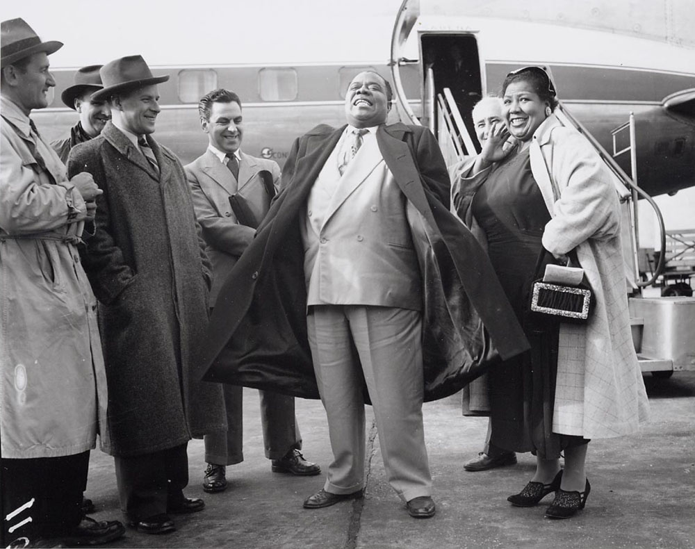 De Amerikaanse jazz trompettist en zanger Louis Armstrong op doorreis met Sabena naar Brussel voor een concert in de Paleis van Schone Kunsten, Schiphol, 8 oktober 1952 Foto Ben van Meerendonk / AHF, collectie IISG, Amsterdam